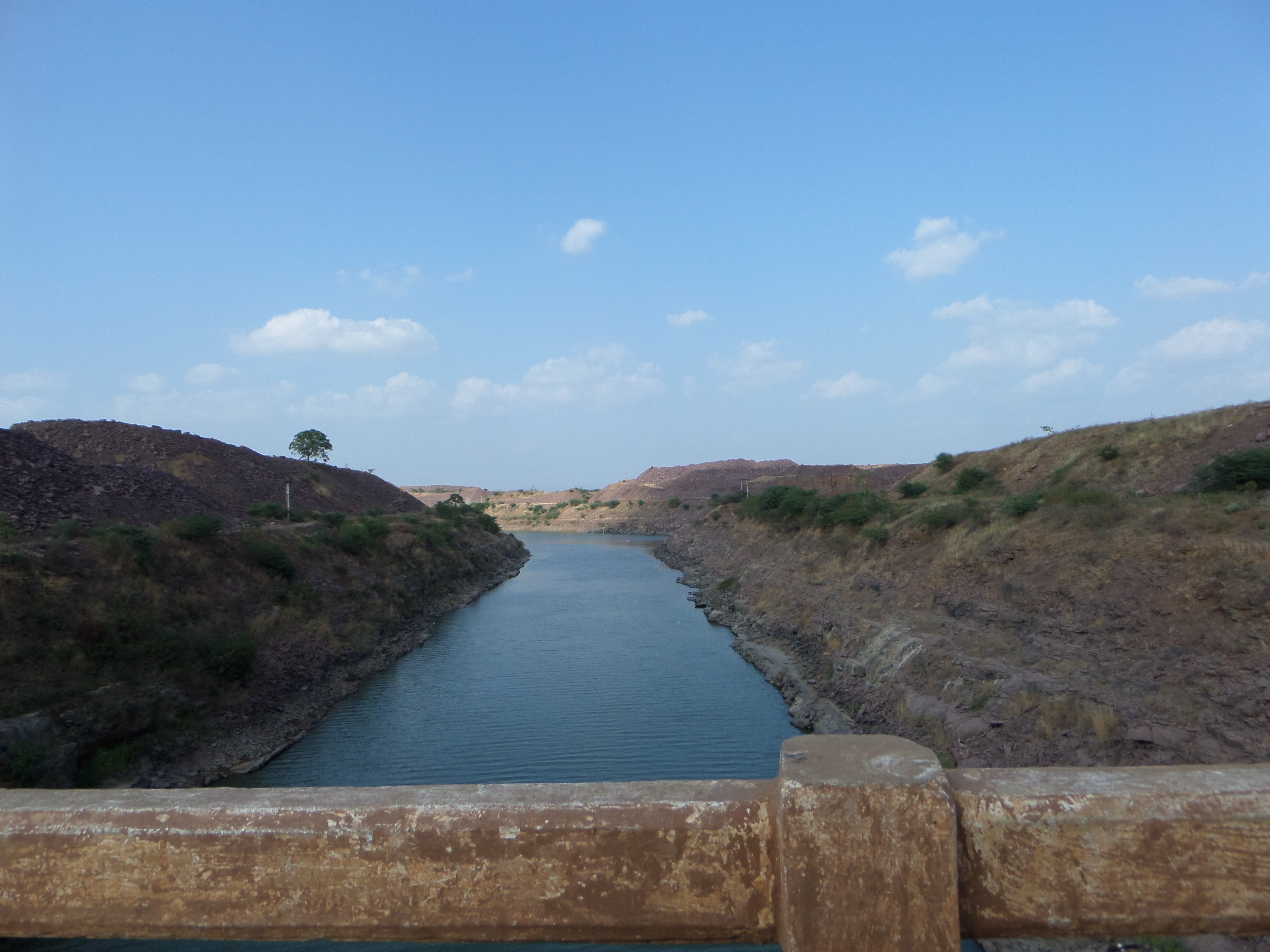 TELUGU GANGA !ATMAKUR,AP